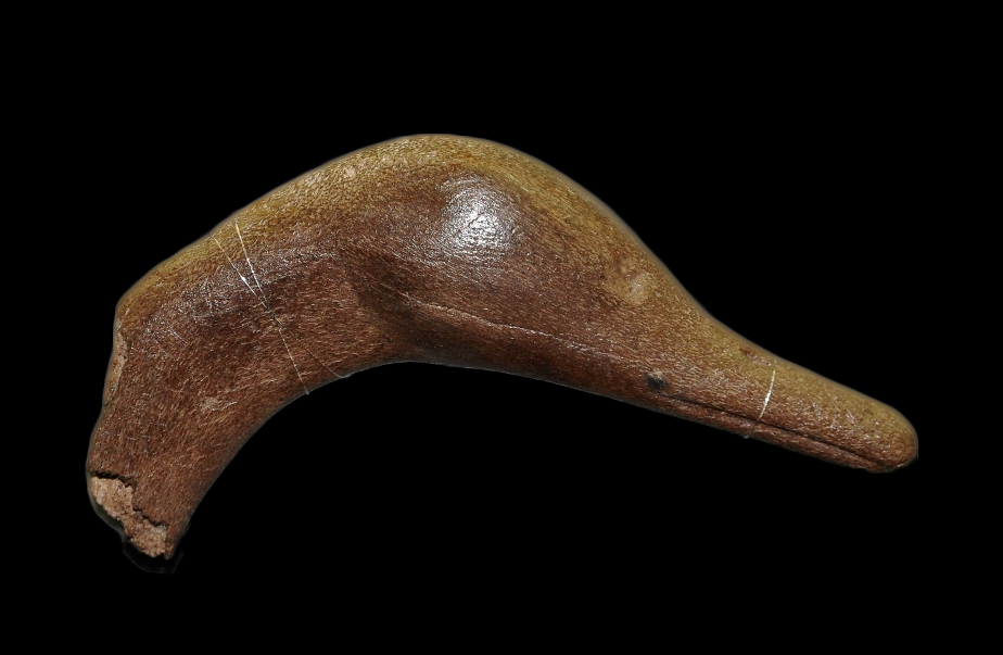 Галоўка качачкі. Неаліт. Рог. Паселішча Асавец-ІІ Бешанковіцкага раёна Віцебскай вобласці. Раскопкі М.М. Чарняўскага.